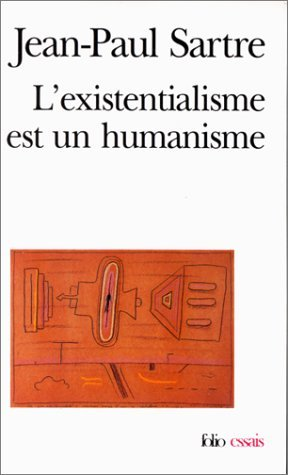 Illustration de la couverture du livre